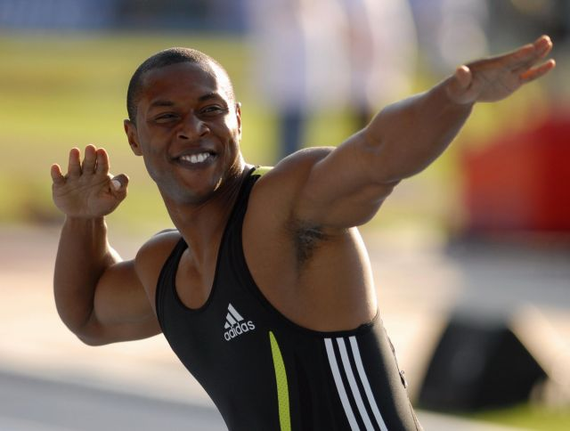 Bernard Williams during Keien Meeting 2007